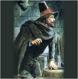 Gaja